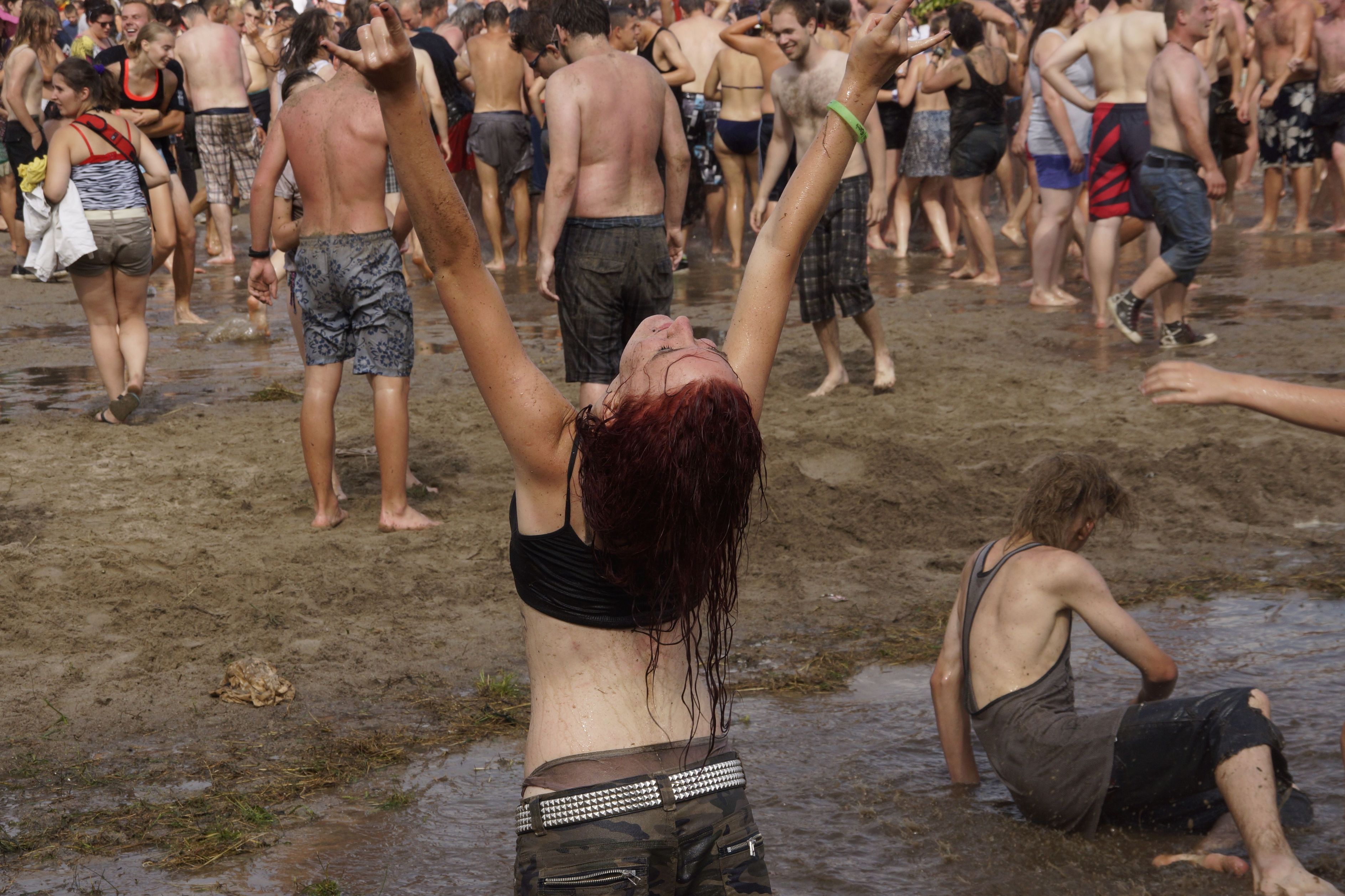 Przystanek Woodstock 2013